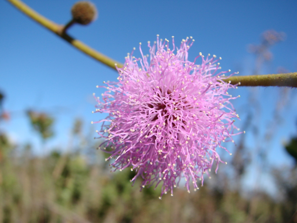 Mimosa claussenii, Fabaceae, Mimosoideae - Brasilien/Brasil: Distrito Federal, Jardim Botanico de Brasília